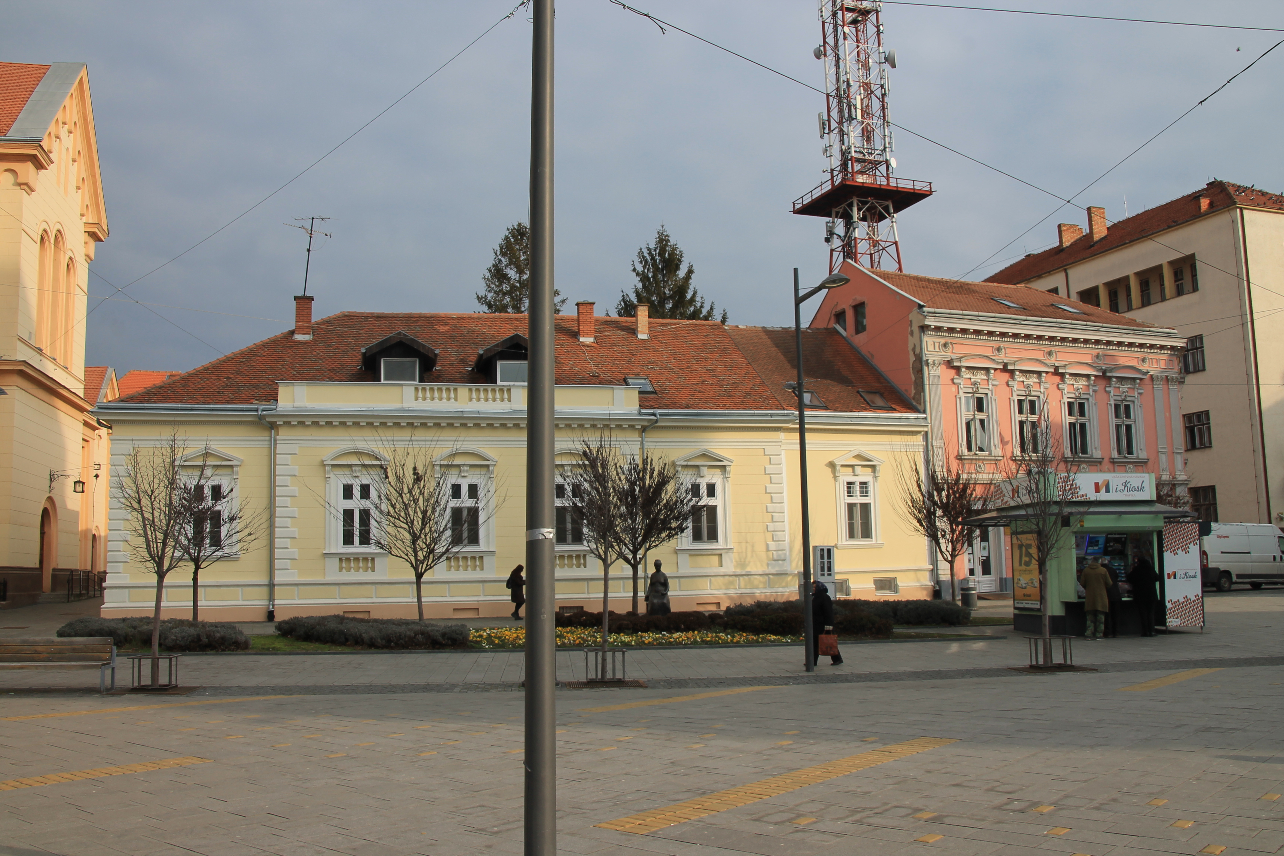 Staro jezgro Zrenjanina